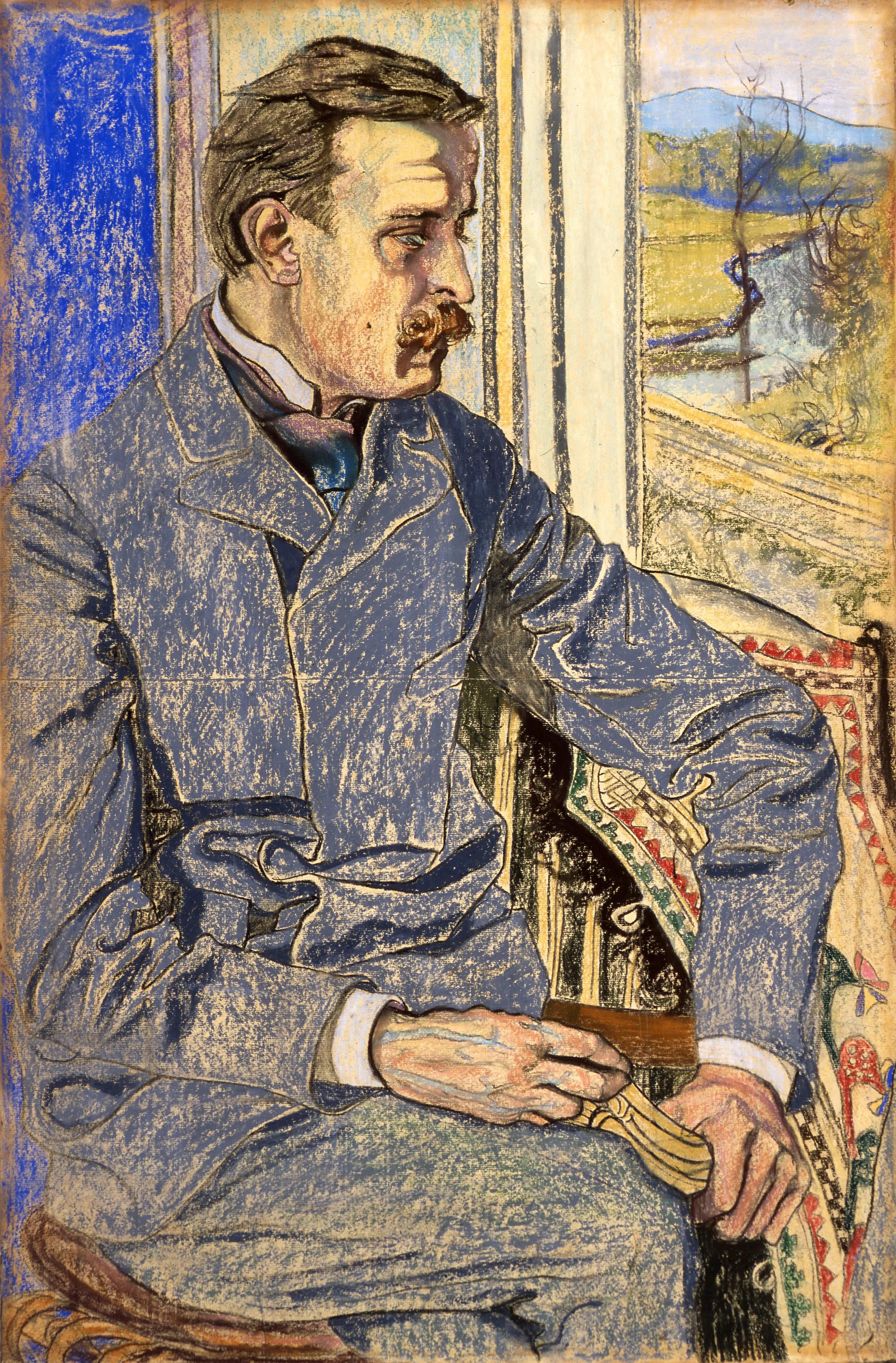 Portret Juliana Pagaczewskiego 1904